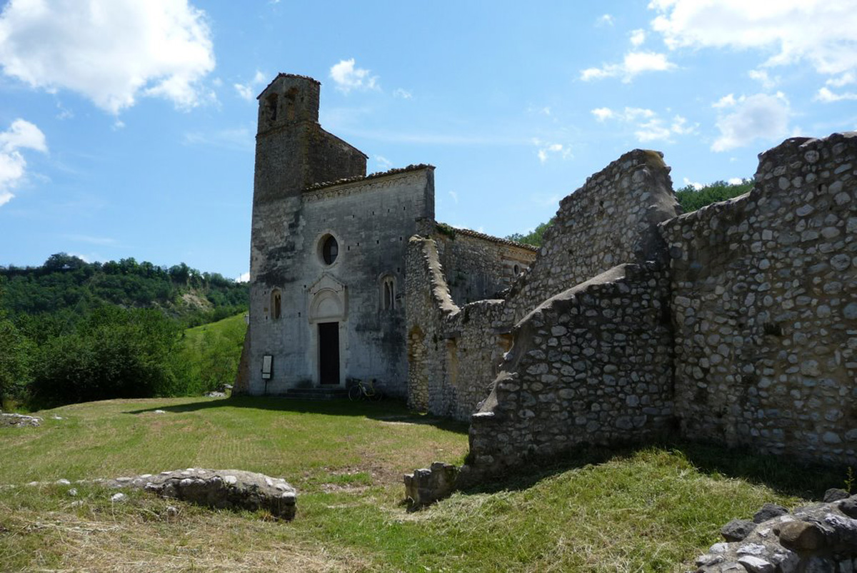 Chiesa di San Giovanni ad insulam, esterno giorno dell'edificio religioso appartenente al complesso abbaziale omonimo nei pressi del paese di Isola del Gran Sasso in provincia di Teramo, Abruzzo, Italia